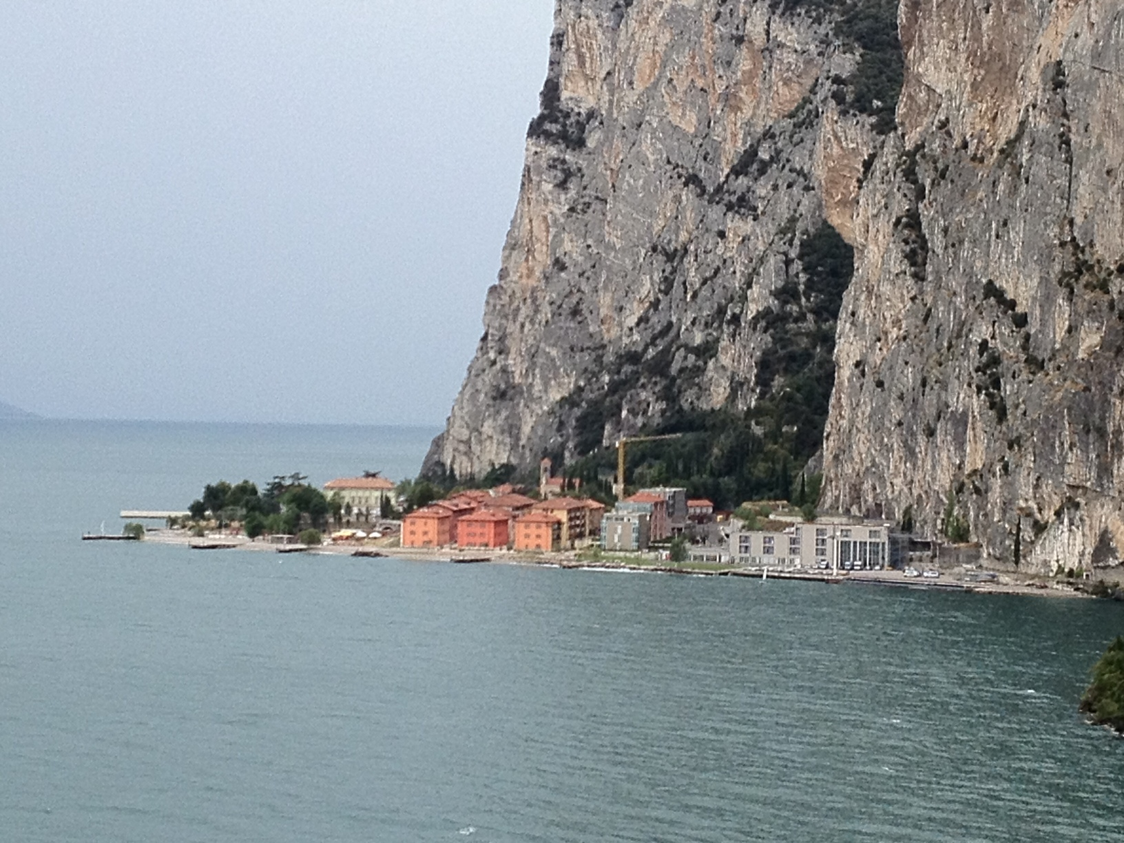 Blick auf Campione aus nördlicher Richtung, 2013